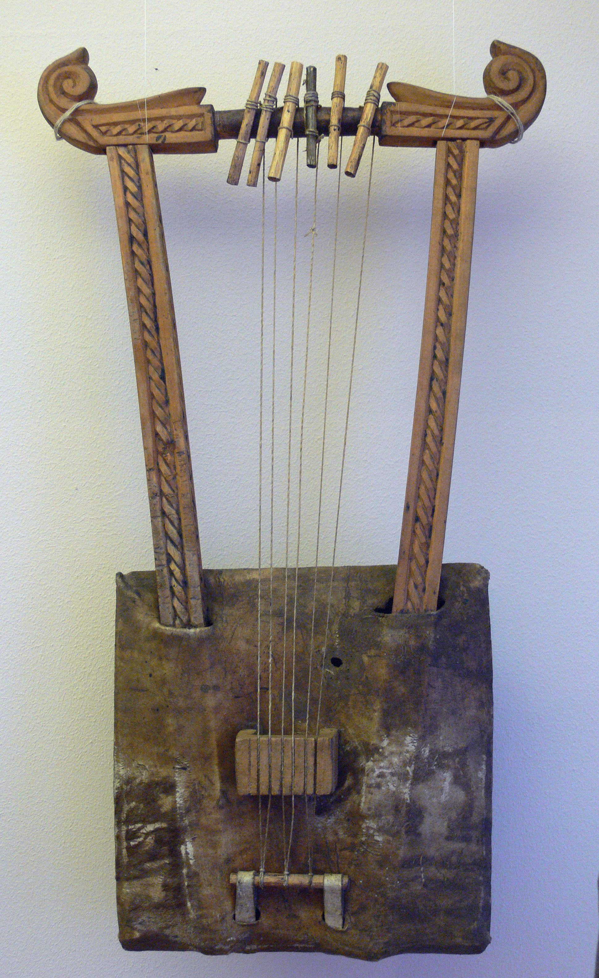 Stuttgart, Linden-Museum Krar (äthiopische Leier) aus Holz, Rohhaut, Darmsaiten, Pflanzenfasern; Inv. Nr. F 55.878